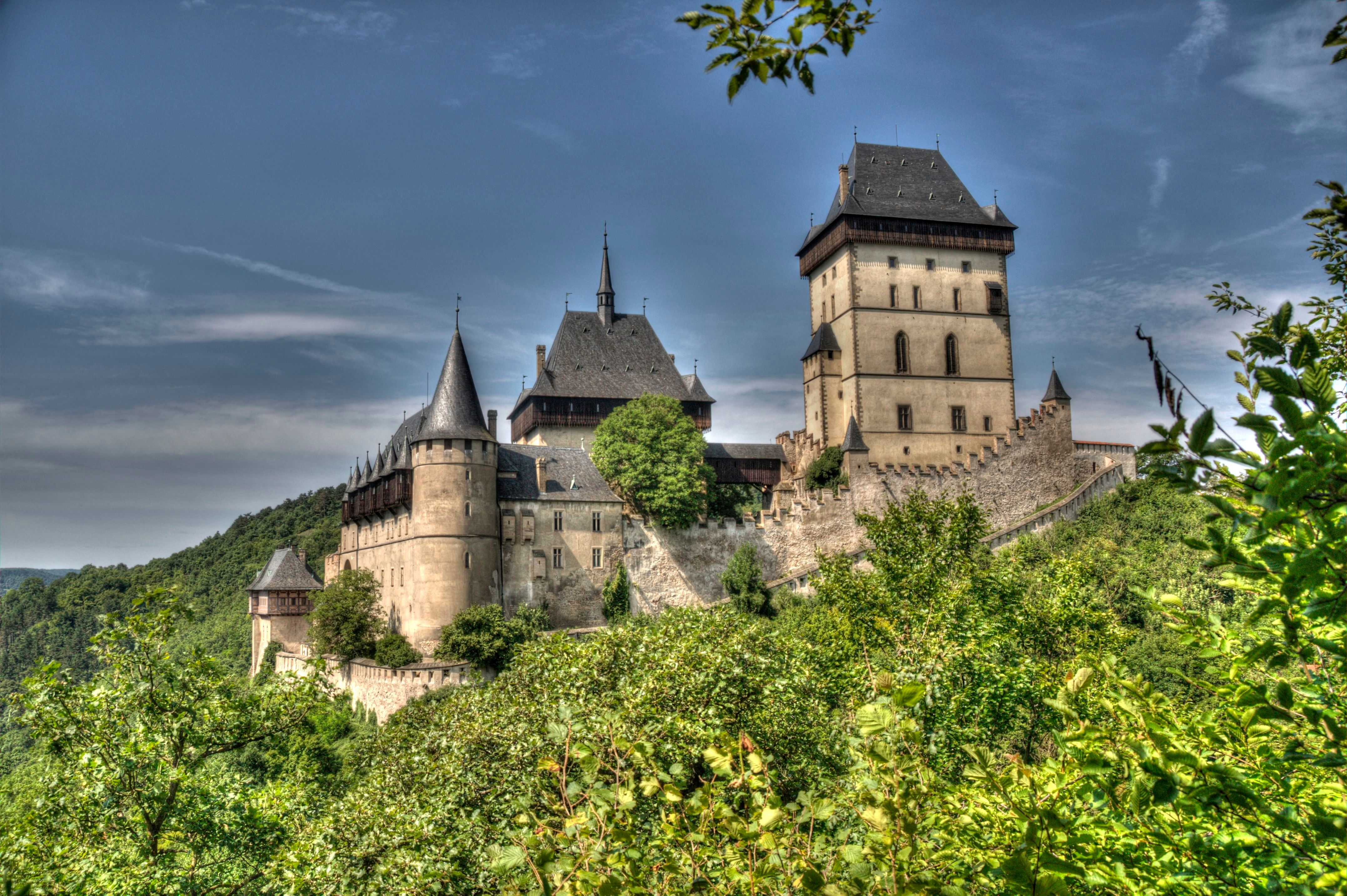 Pohled z Haknovce od východu